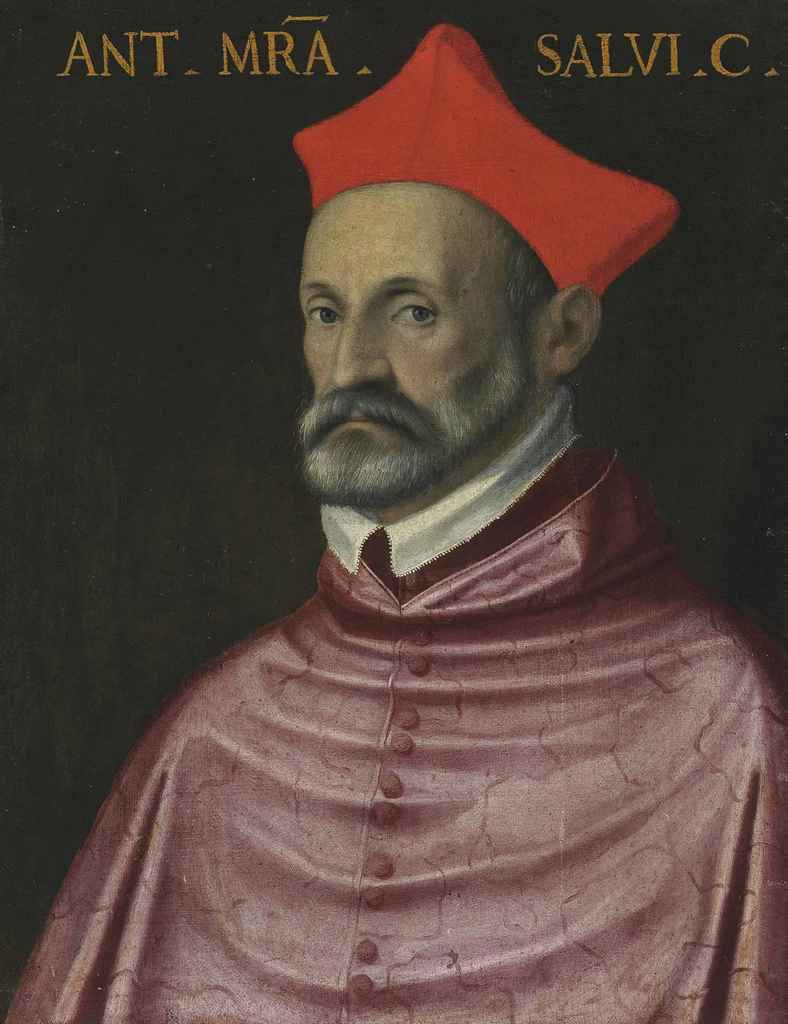 Portrait du cardinal Anton Maria Salvati